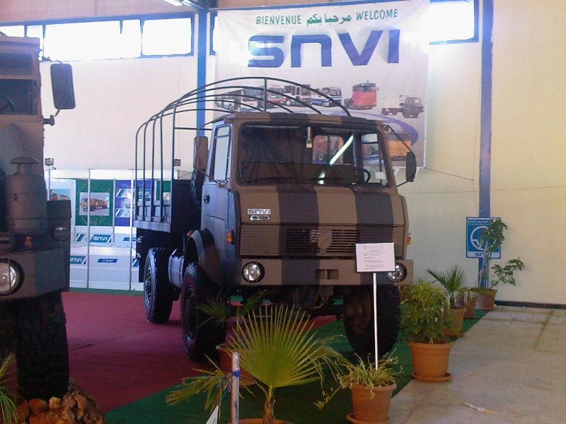 Camion de transport de troupes algérien